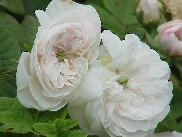 Species: Rosa damascena Family: Rosaceae Cultivar: cultivar: Rosa 'Madame Hardy', Hardy 1832 Image No. 3